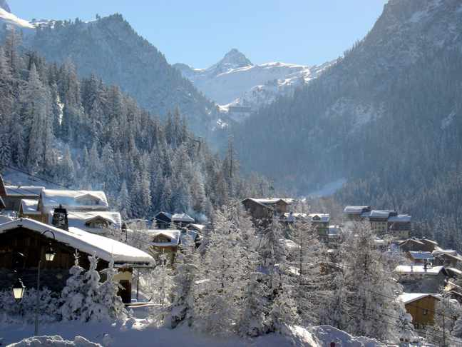 station de Valfréjus